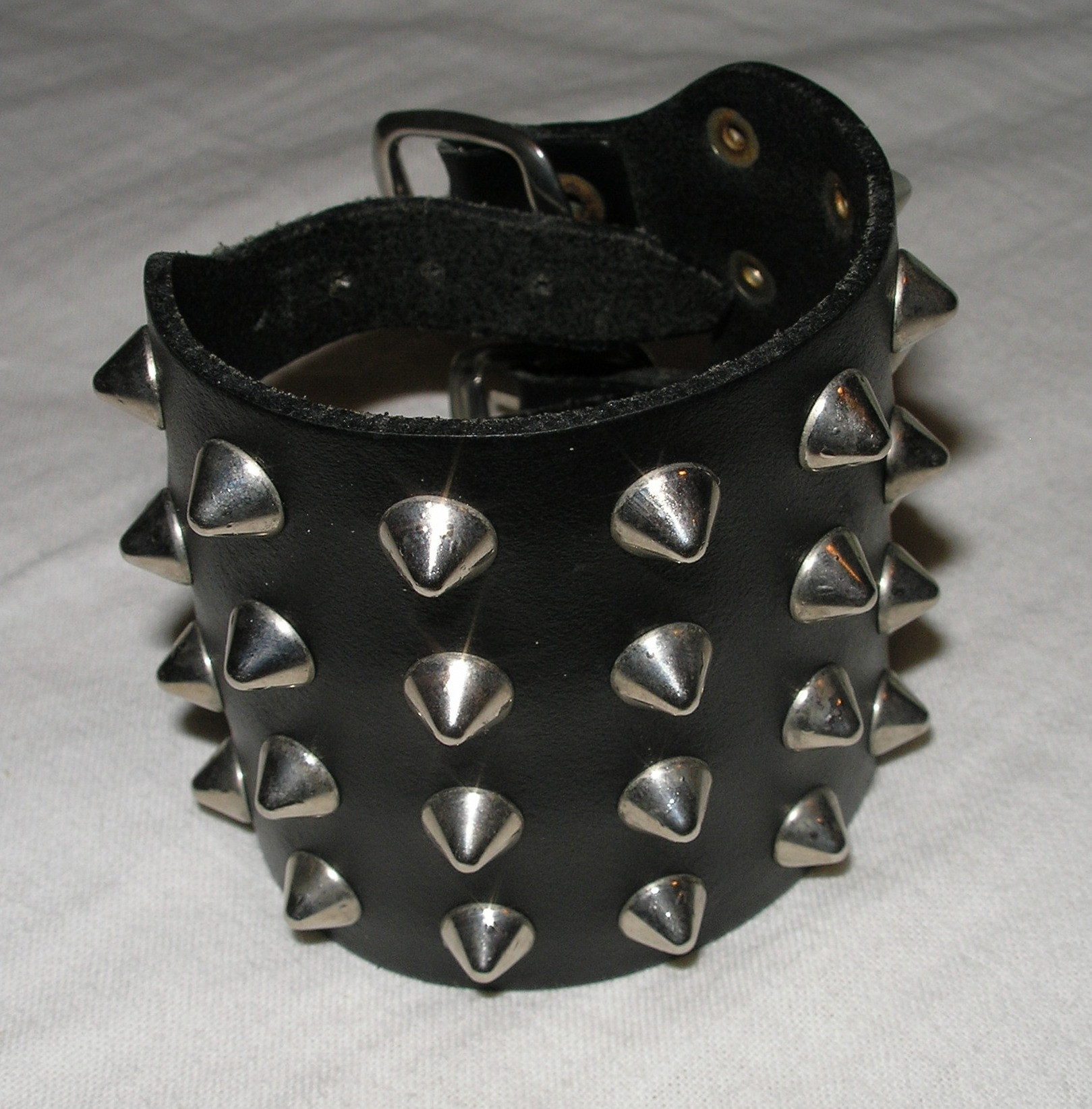 A spike band